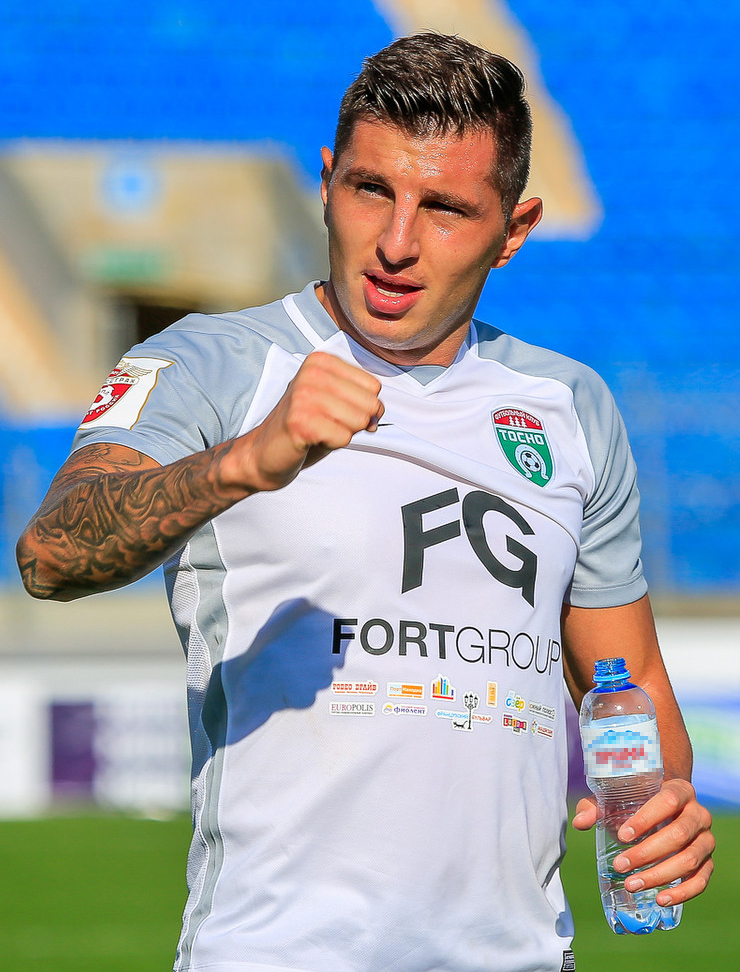 «Тосно» - «Спартак»